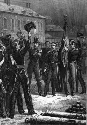 "Insurrection de Strasbourg". En 1836, Louis-Napoléon Bonaparte tente un coup d'État militaire à partir de Strasbourg.